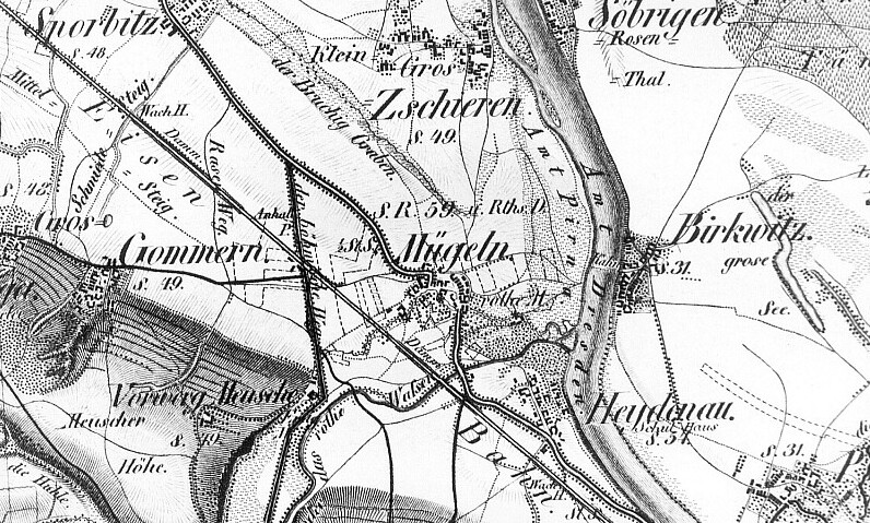 Original image description from the Deutsche Fotothek Heidenau-Mügeln. Pirna, Oberreit, Sect Dresden, 1821/22